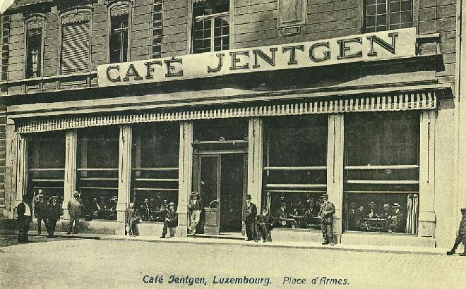 Luxembourg, ancien Café Jentgen, situé Place d'Armes (vers 1900)